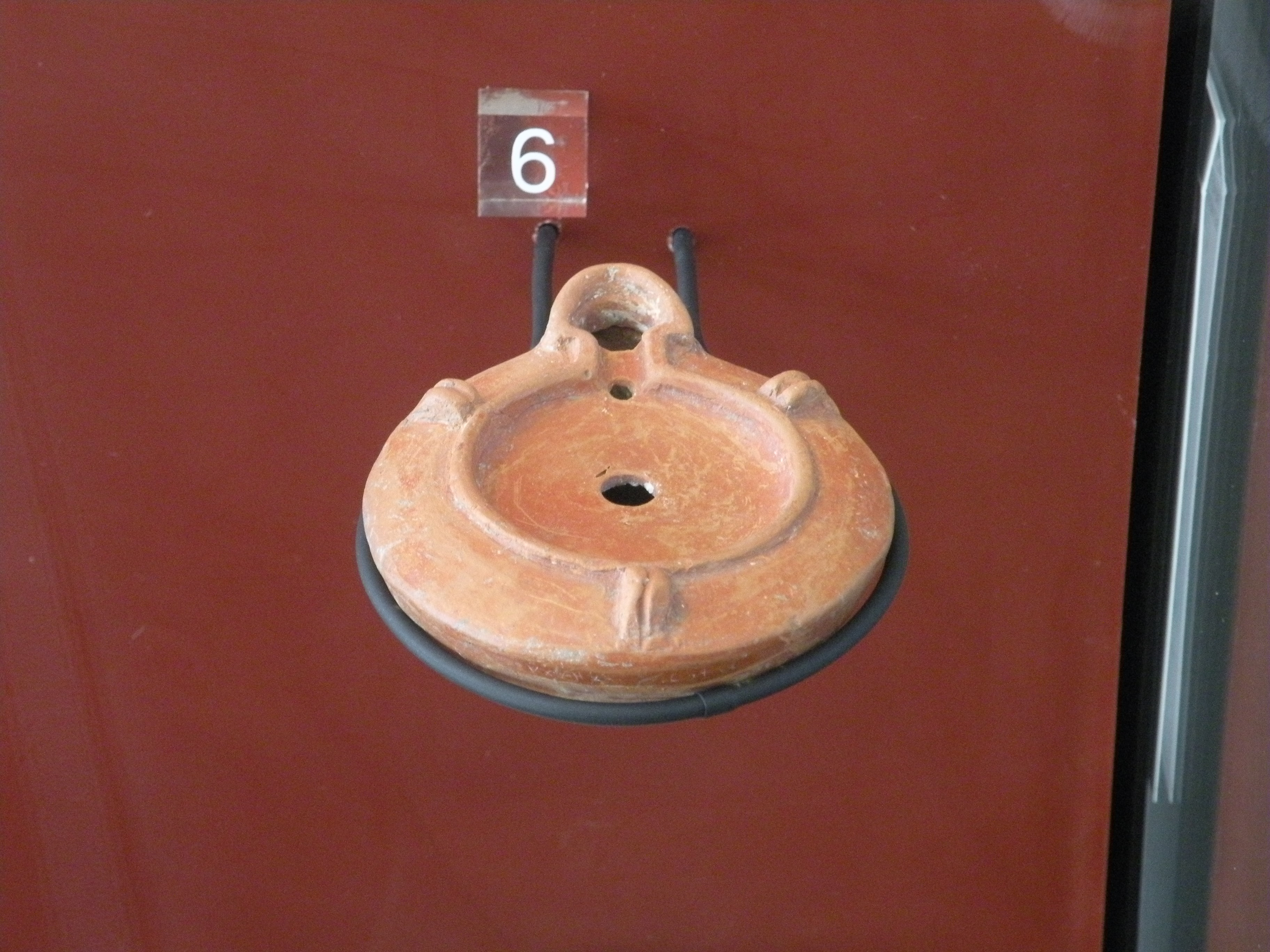 Vieux-la-Romaine Museum lampe à huile